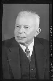 Porträtfotografie von Helmuth von Glasenapp